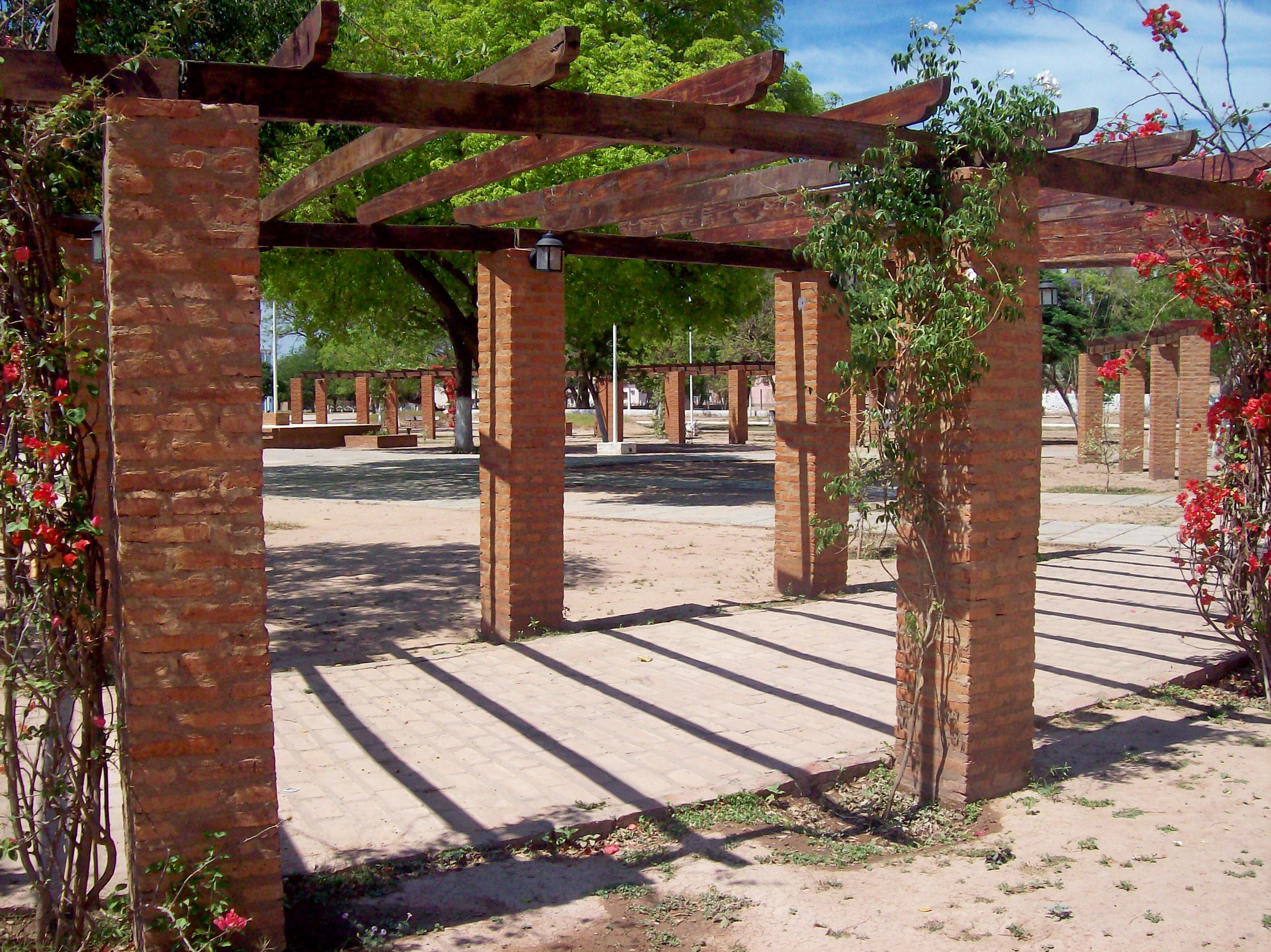 Plaza principal de Taco Pozo, en Departamento de Almirante Brown, Provincia del Chaco, República Argentina.